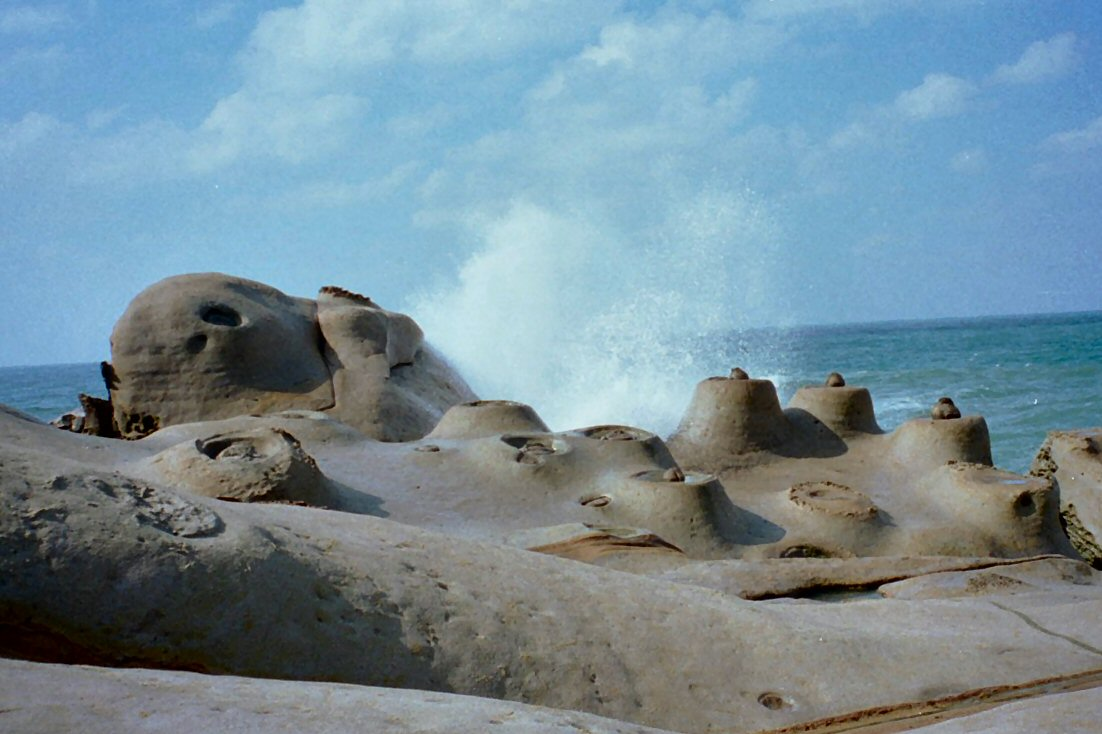 Taiwan - Yehliu Eigen werk - 1997